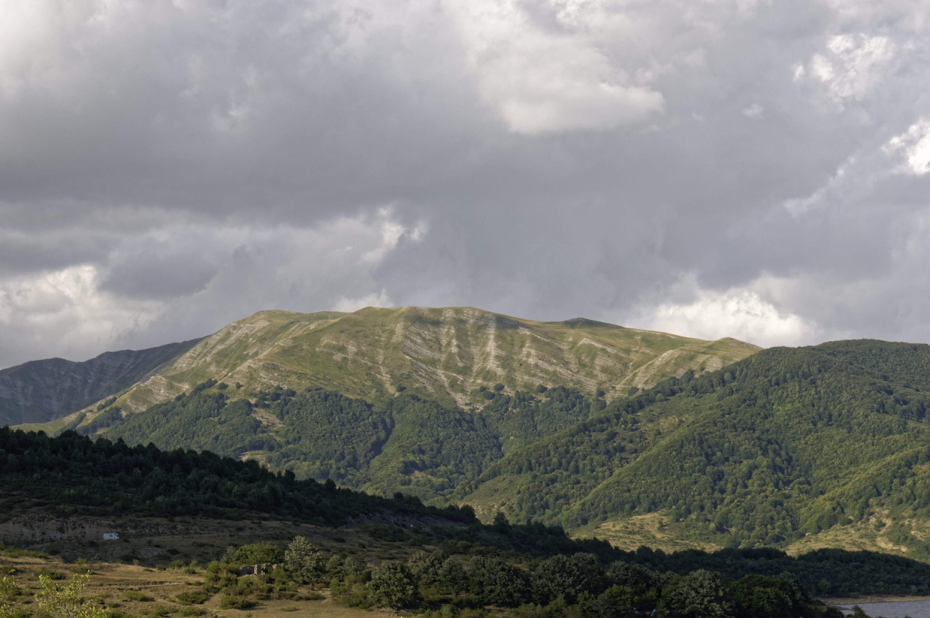 Lago di Campotosto 2015 Dieses Foto entstand in Zusammenarbeit mit Stadtbesichtigungen.de Die Seiten Stadtbesichtigungen.de, der dazugehörige Reise Blog sowie die Facebookseite: Stadtbesichtigungen Rom dürfen dieses Bild für Ihre Veröffentlichungen ohne den Hinweis auf Wikipedia, Commons bzw der Lizenz verwenden. Die Verantwortlichen habe von mir (Ra Boe) die Originaldaten zur freien Verfügung übermittelt bekommen.